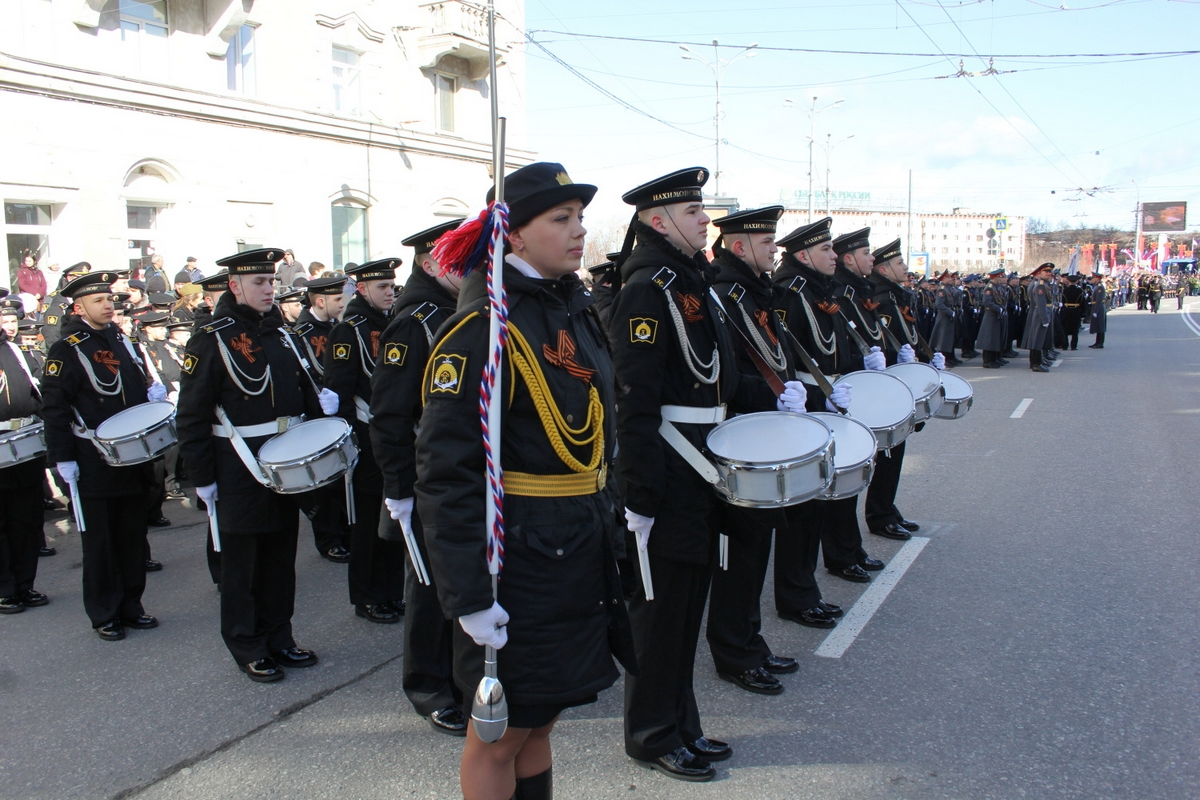 В Мурманске прошёл военный парад, посвященный 74-й годовщине Победы в Великой Отечественной войне